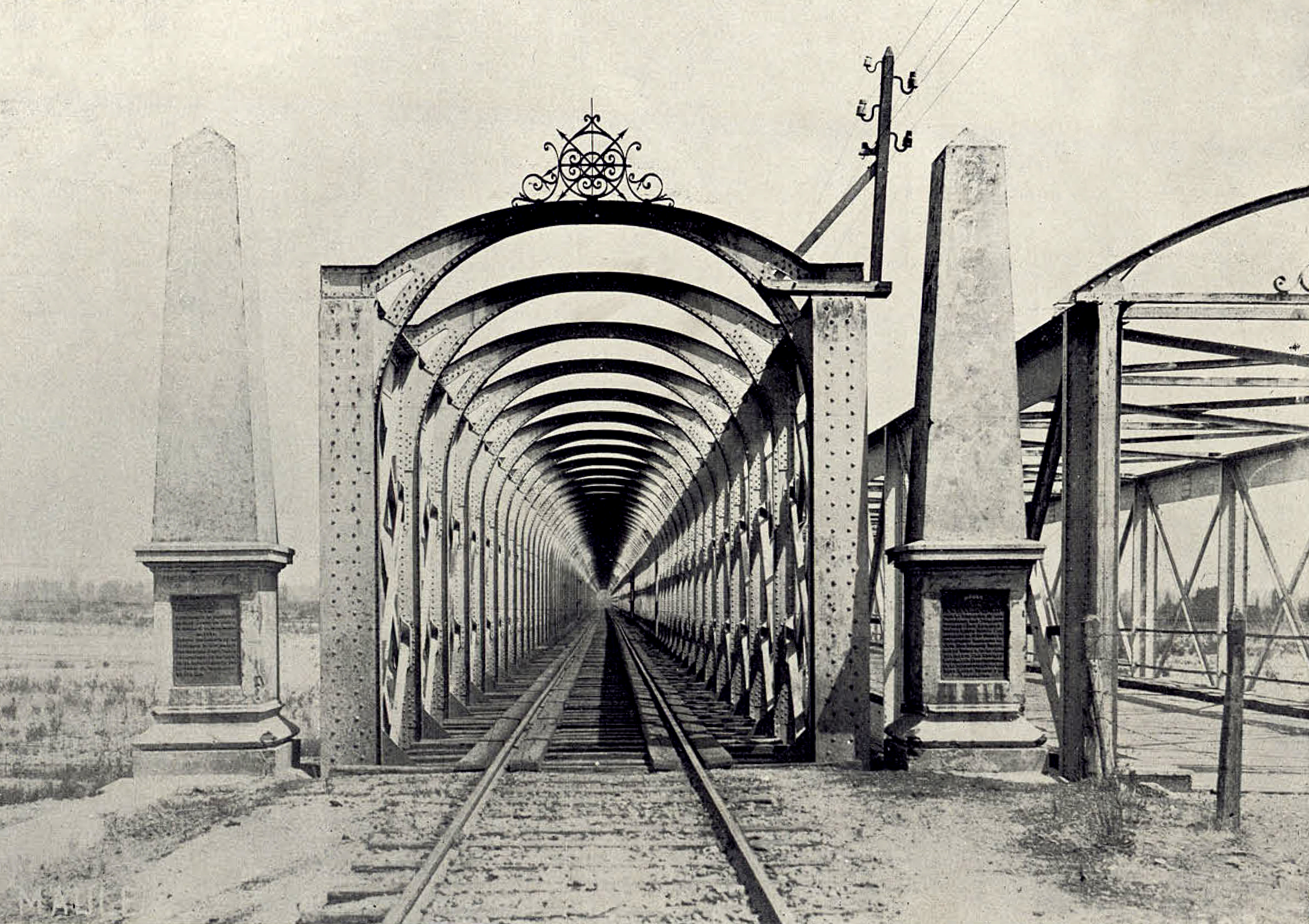 Fotografía tomada ca. 1909 desde la ribera norte del puente ferroviario sobre el río Maule, proyectado por Domingo V. Santa María y construido por Lever, Murphy y Cía, en 1885.